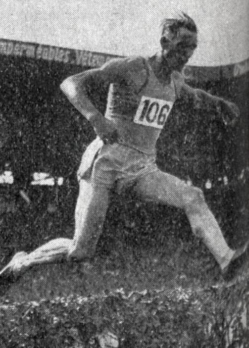 Jean Gallet, champion de France du 3000 mètres steeple en juillet 1946.